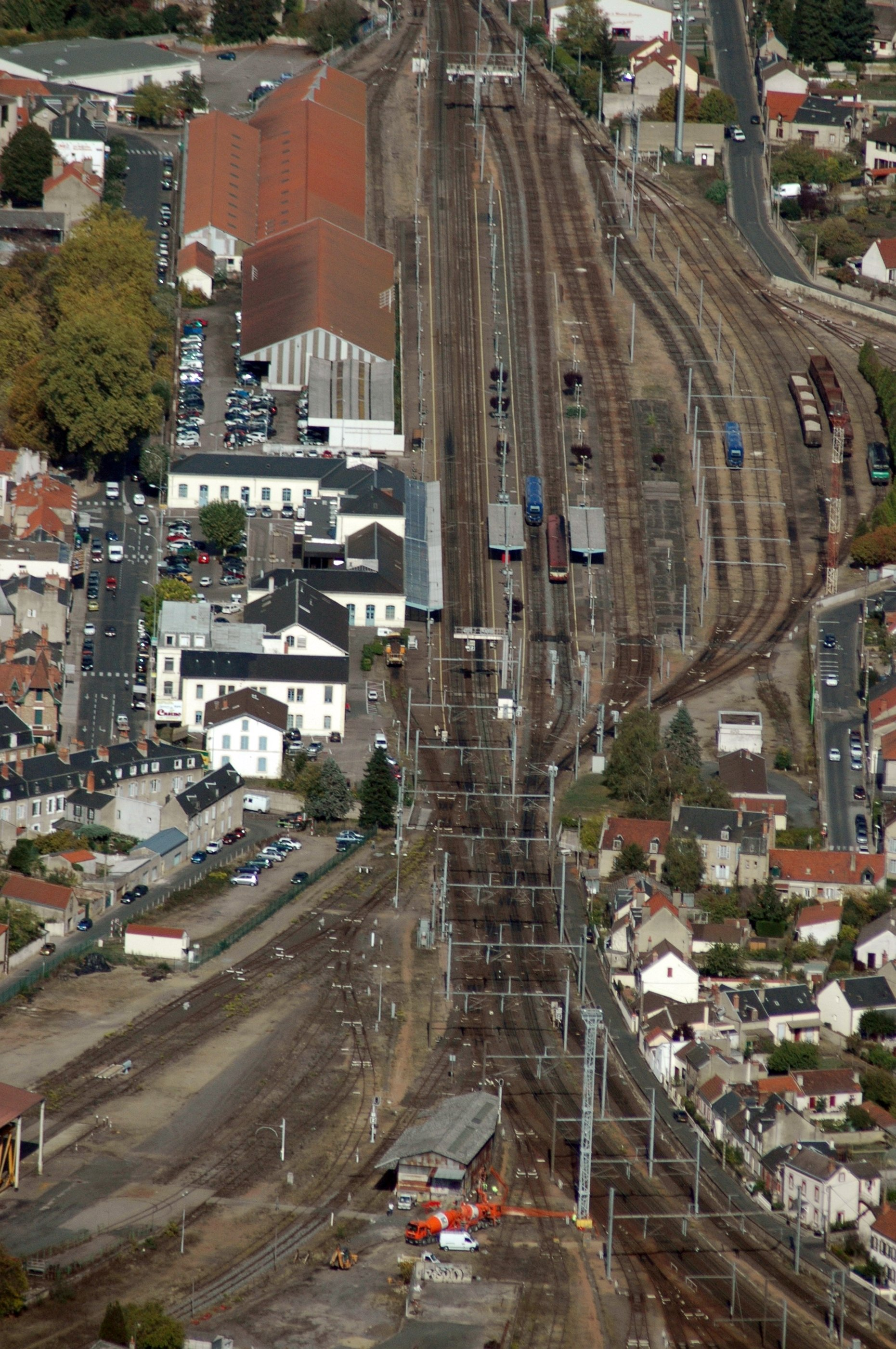 La gare de Moulins, Allier, France.